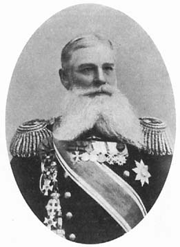 Russian Admiral Oskar Enqvist